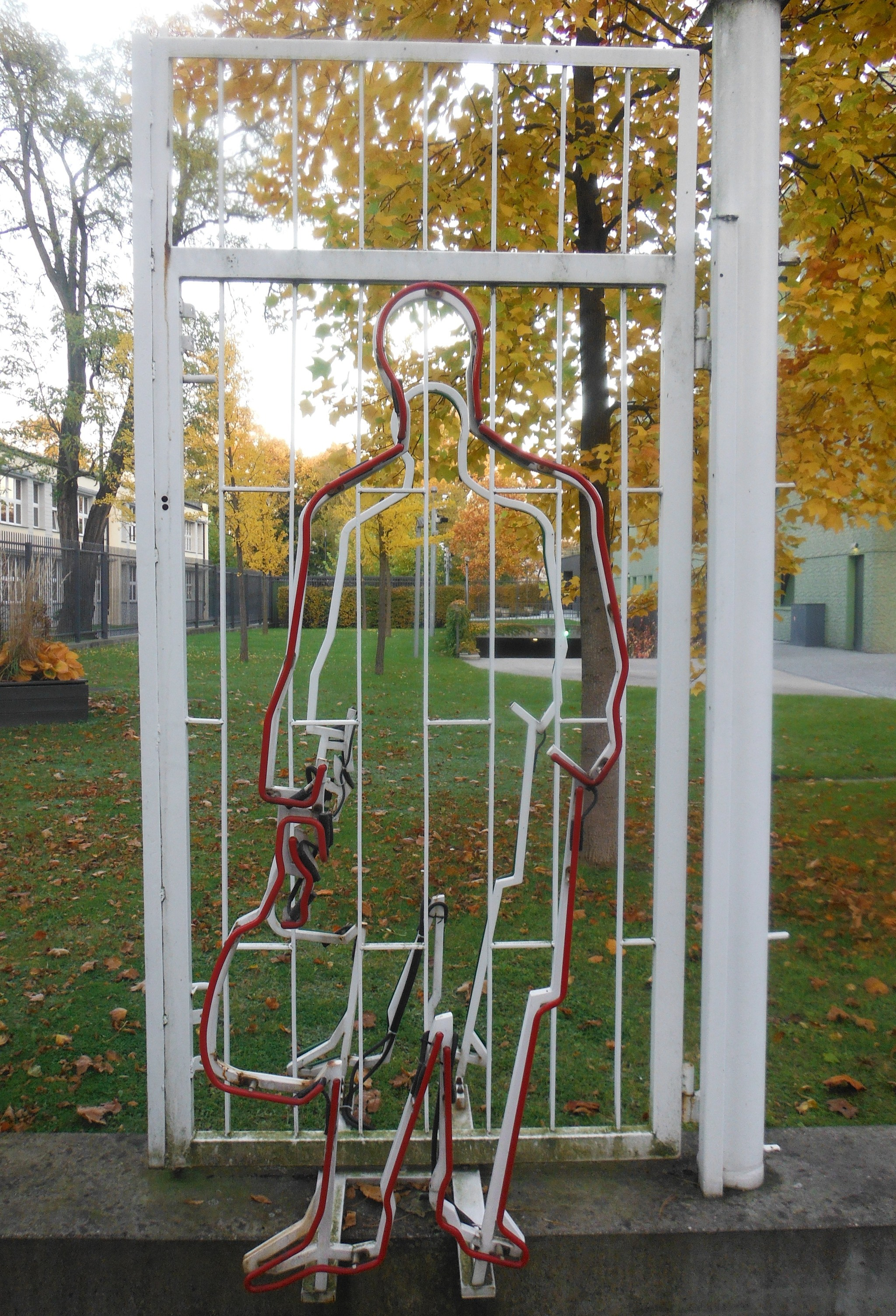 Instalacja artystyczna "Przez Warszawę ku Wolności" na terenie niemieckiej ambasady w Warszawie.